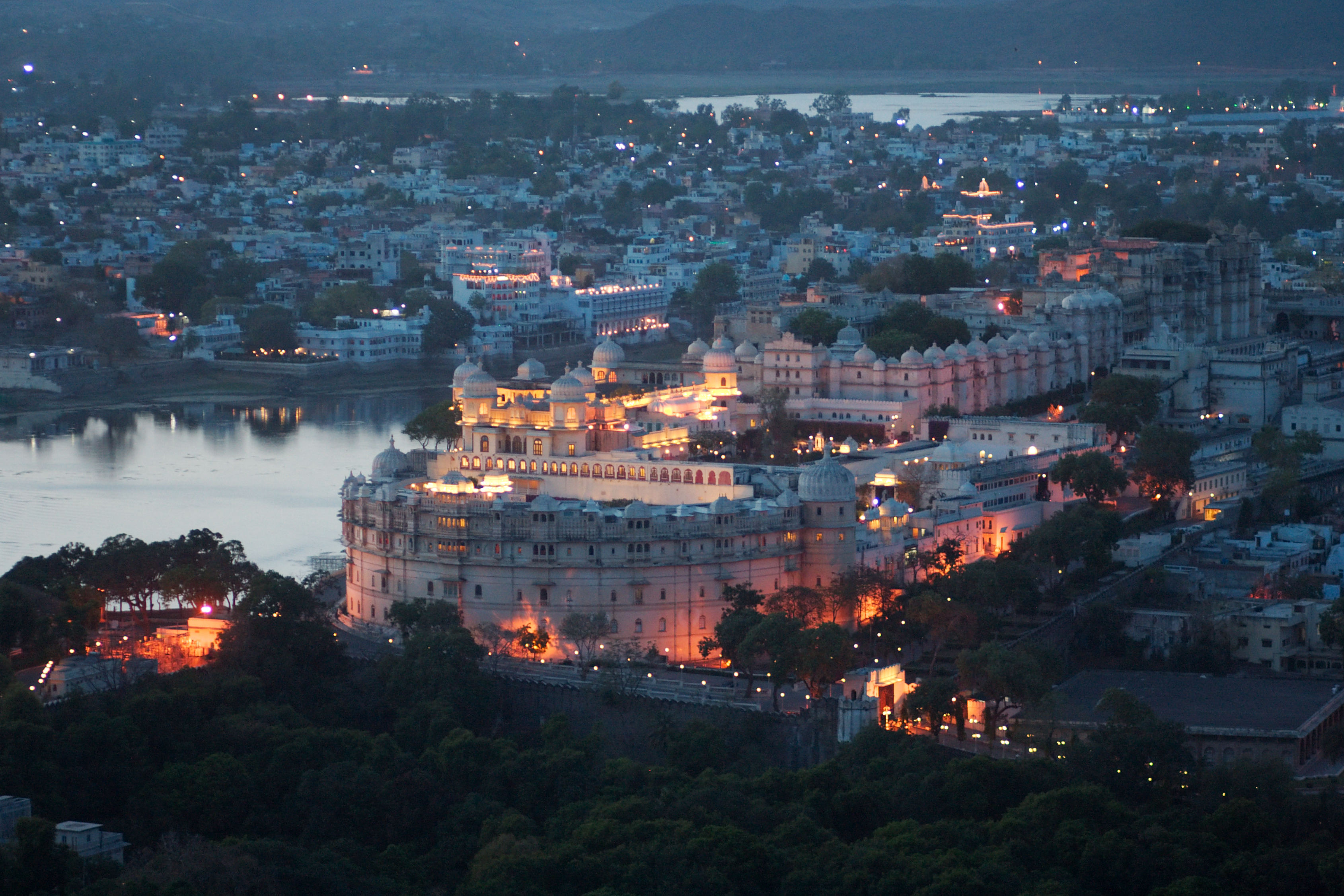 Paläste von Udaipur